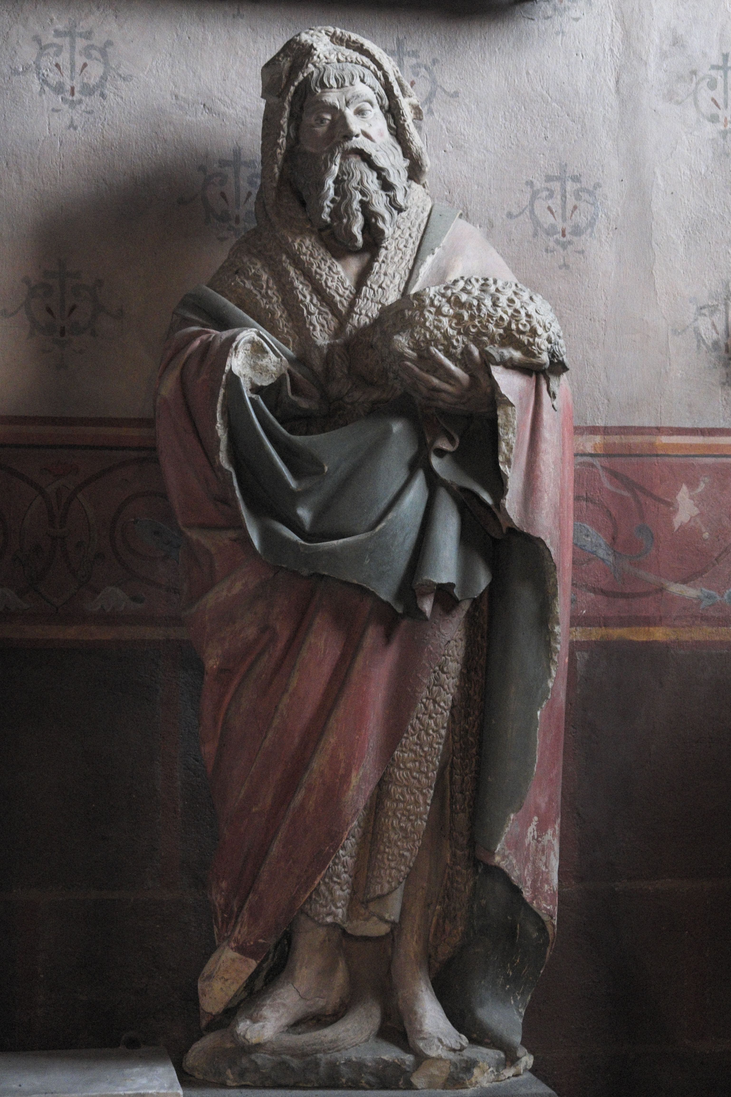 Katholische Kirche Saint-Pierre in Yzeure im Département Allier (Auvergne-Rhône-Alpes/Frankreich), Johannes der Täufer aus dem 15. Jahrhundert